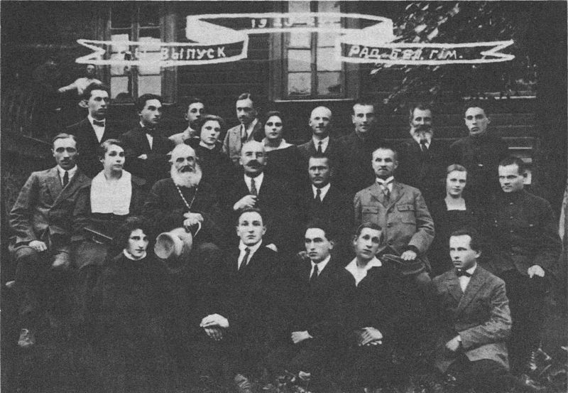 Першы выпуск Радашковіцкай беларускай гімназіі (1923/24 навуч. г.; чацвёрты злева ў другім радзе) А. Уласаў.